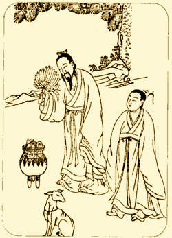 பண்டைய சீன ஓவியம் - போகர் அவருடைய சீடருடன் மலை உச்சியில் நுட்பமான மருந்துகளை தயாரிப்பதாய் இந்த ஓவியம் விளங்குகிறது.